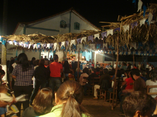 Novena no Povoado da Capela do Rio do Peixe, Igreja de Sant'Ana